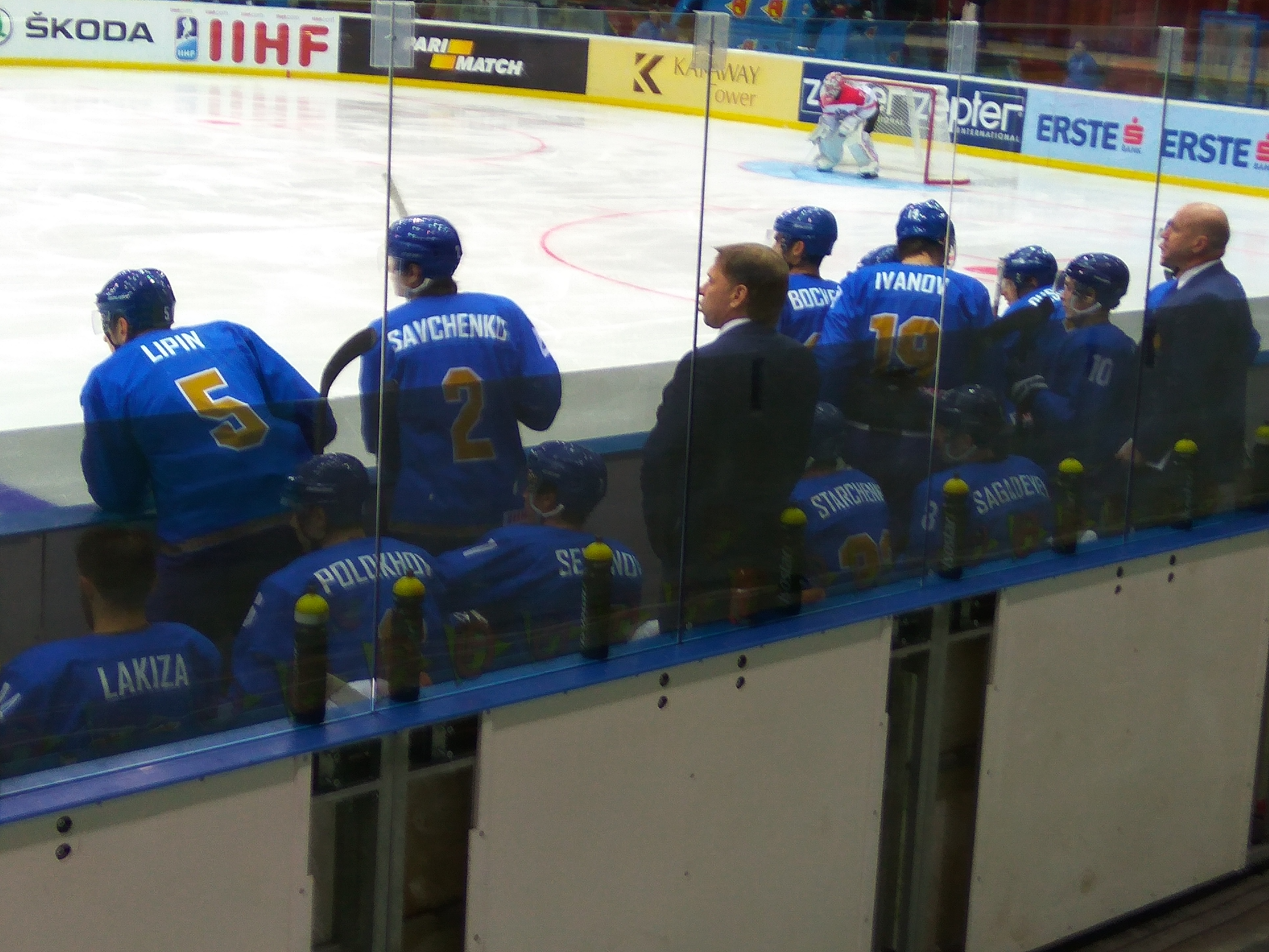 Чемпіонат світу з хокею 2017 у першому дивізіоні. Казахстан-Австрія